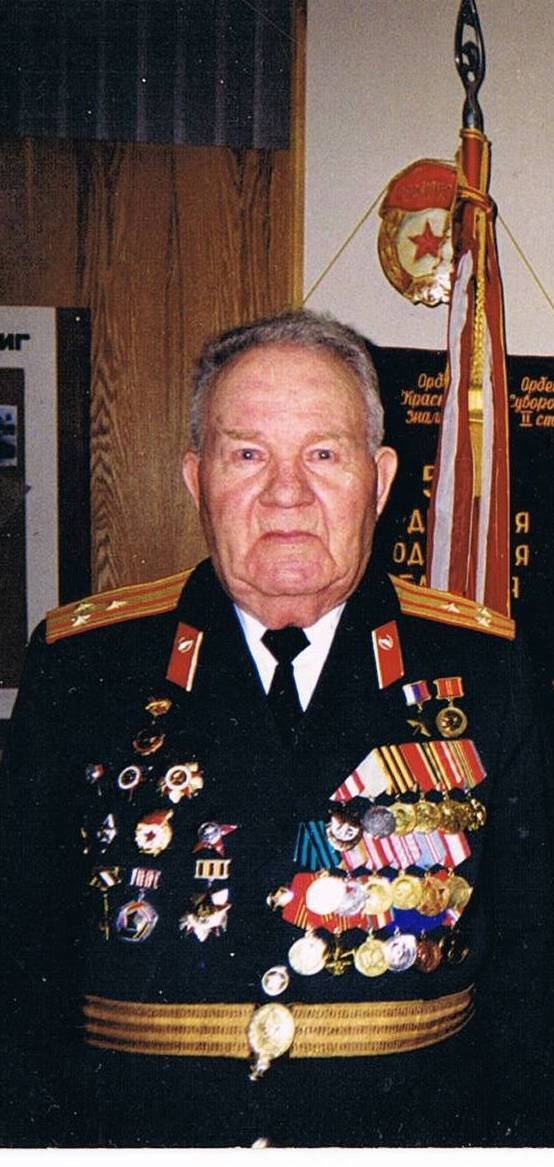 Дорофеев Анатолий Васильевич. Герой Российской Федерации. Москва. День Победы 1996.